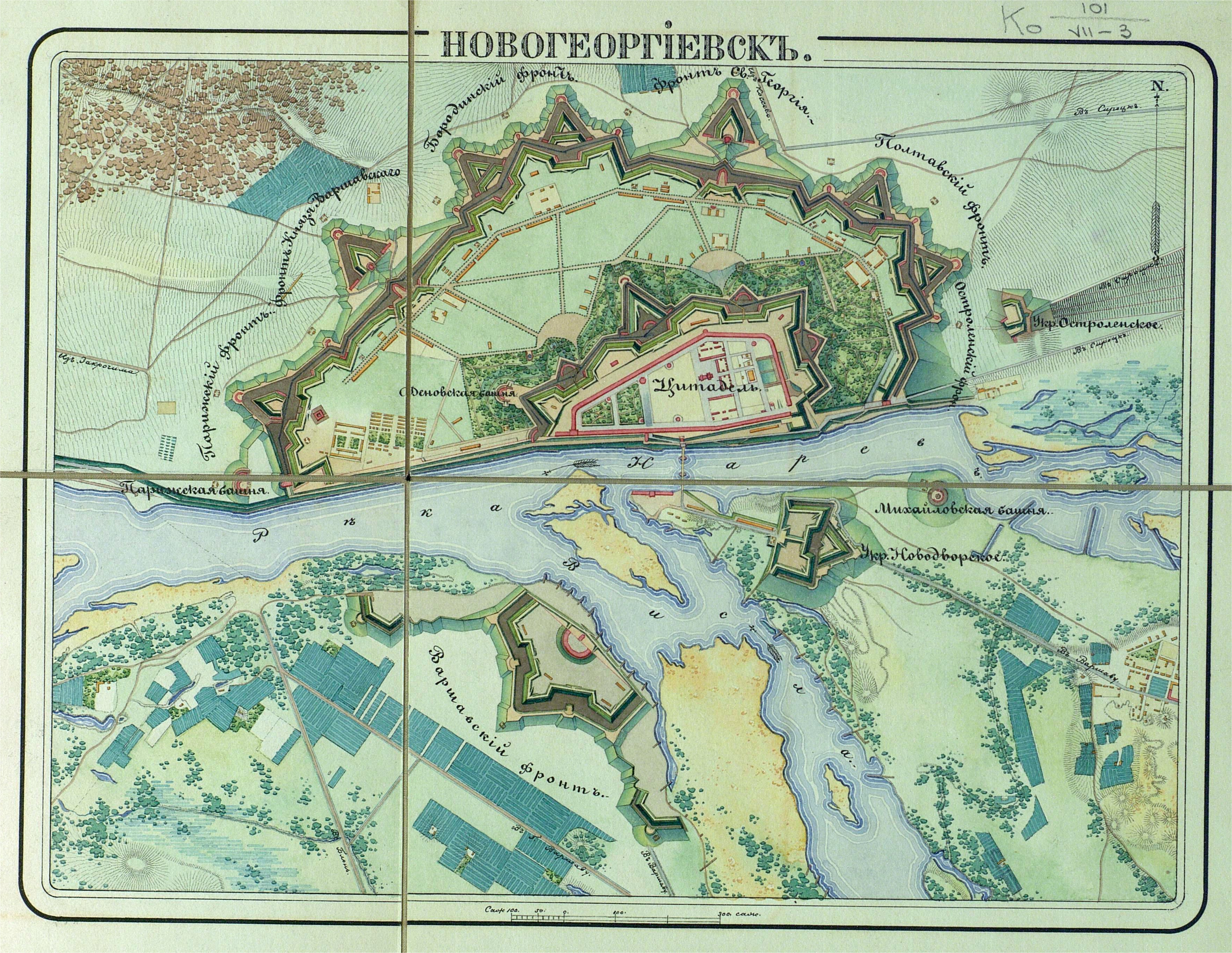 Новогеоргиевск.